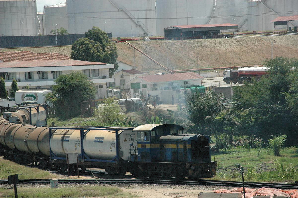 Rail transport in Dar es Salaam